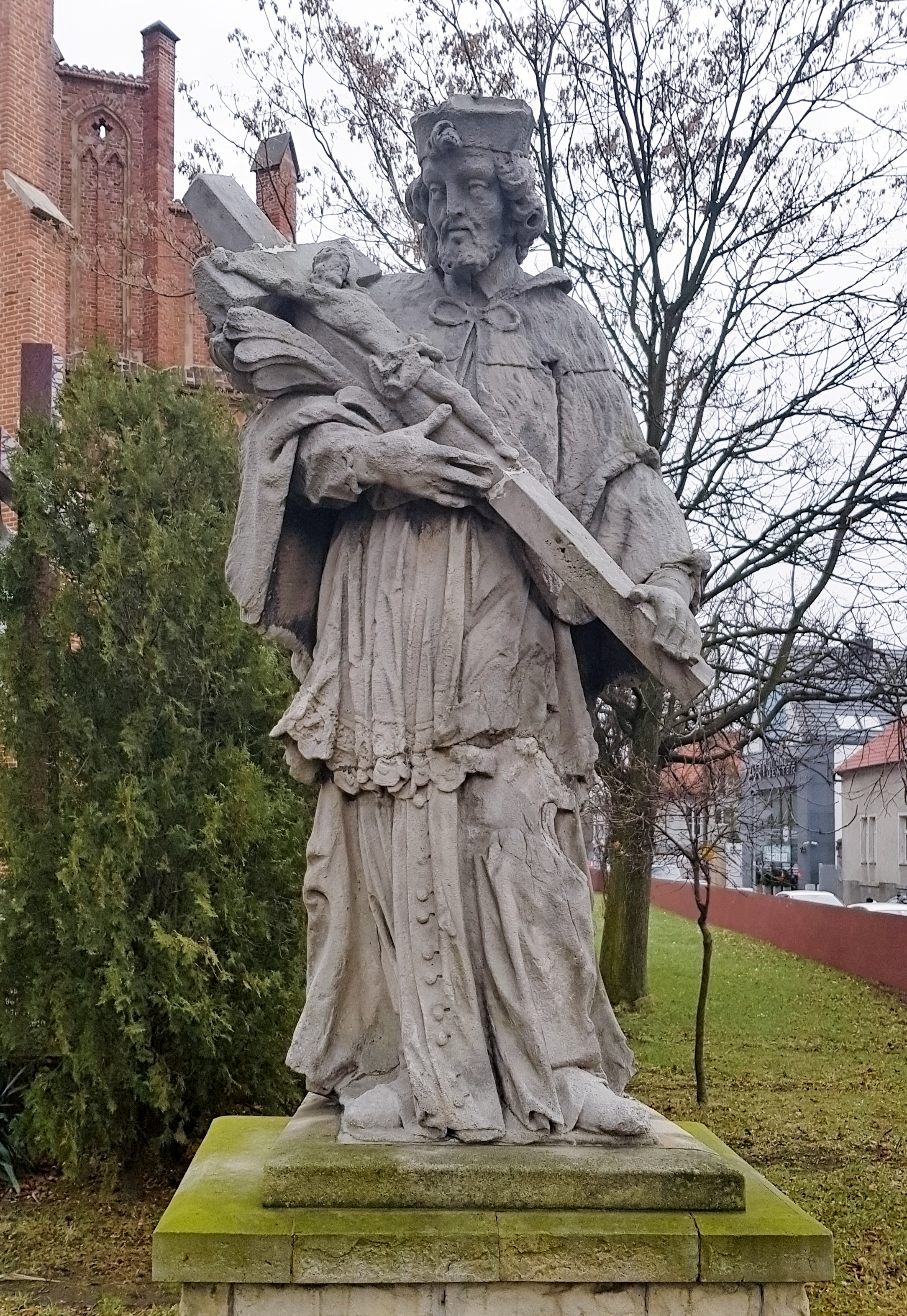 Barokowa figura św. Jana Nepomucena